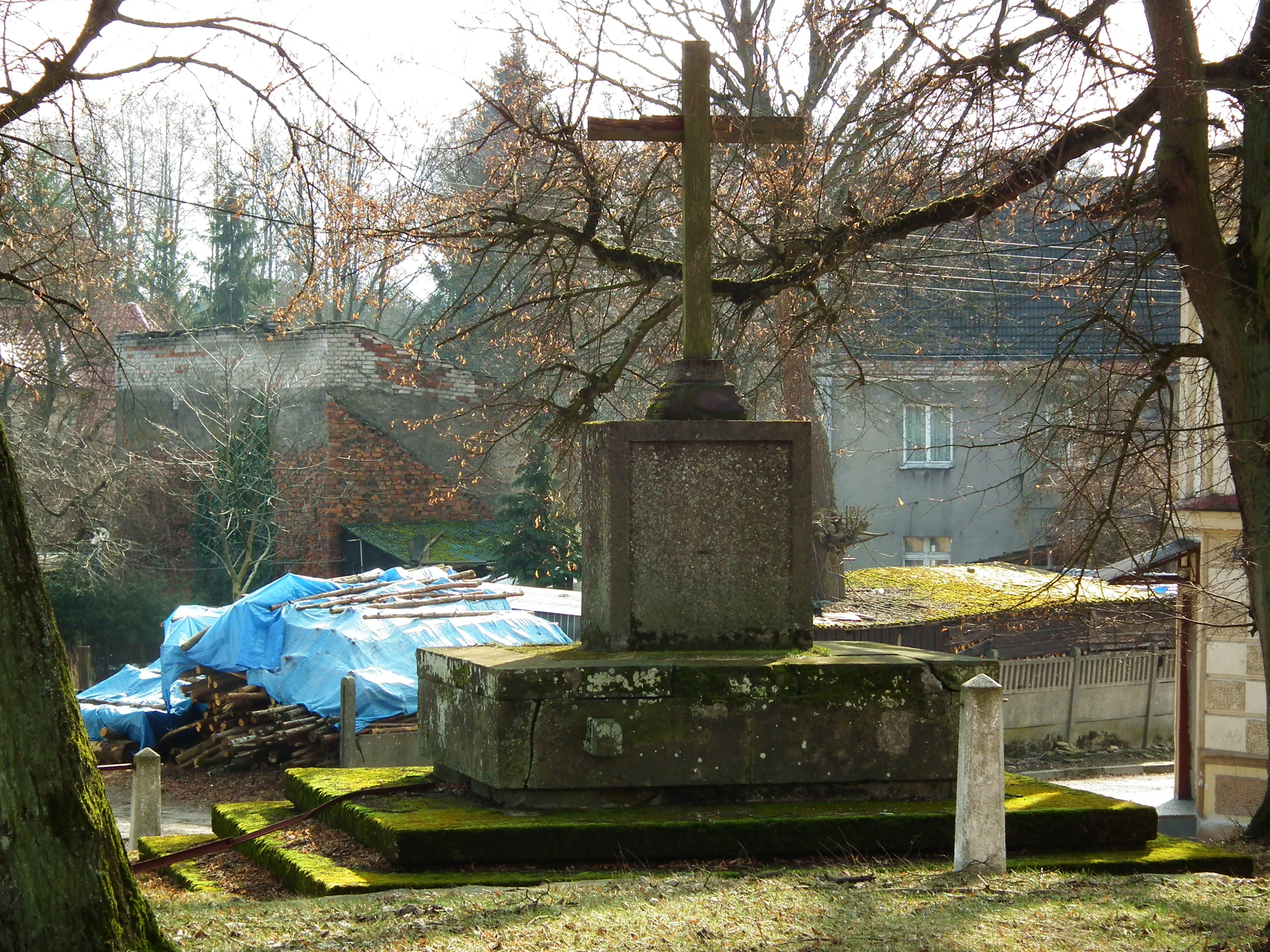 Krajobraz miejski z Lędyczka.